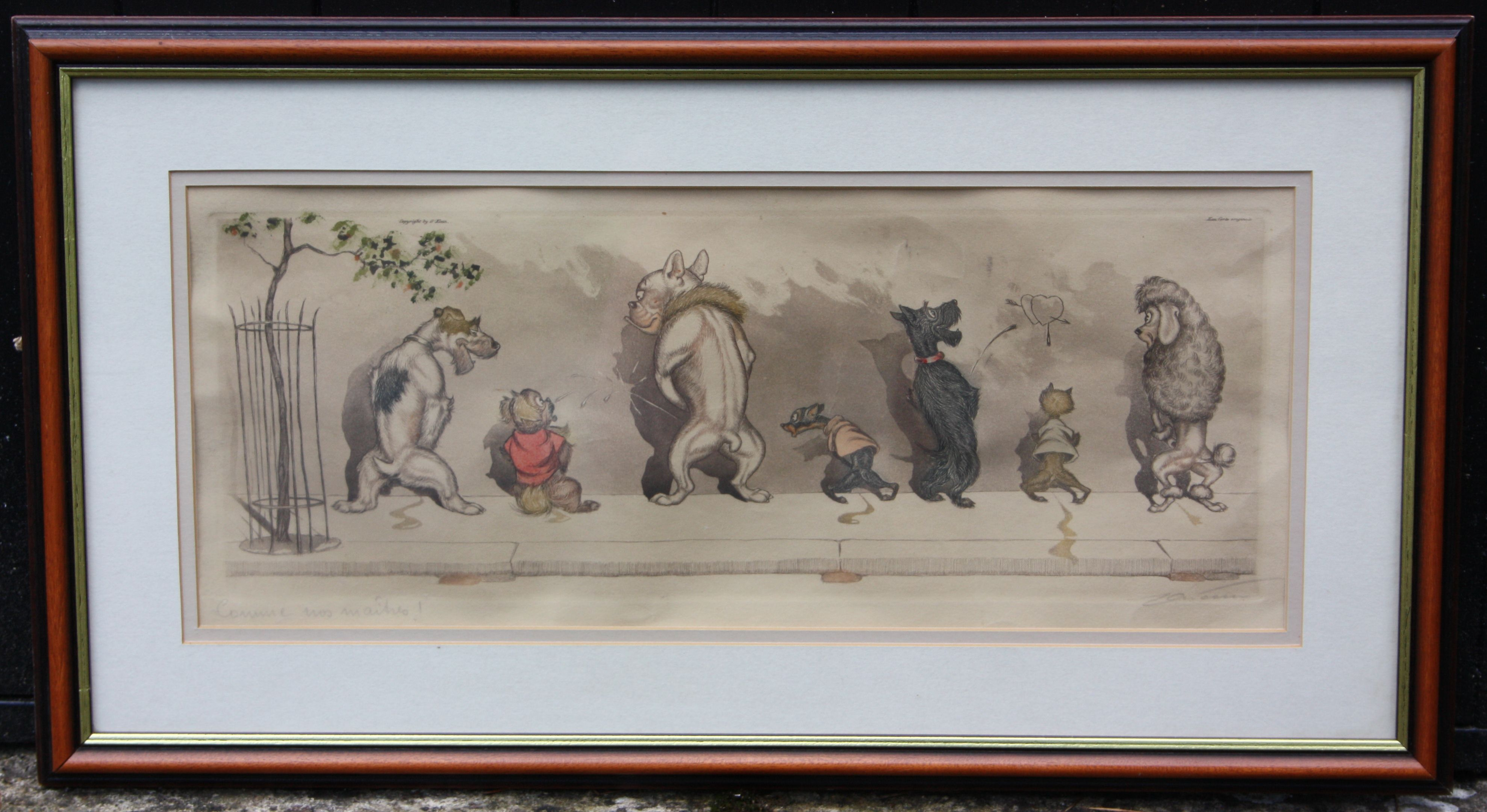 Like our masters